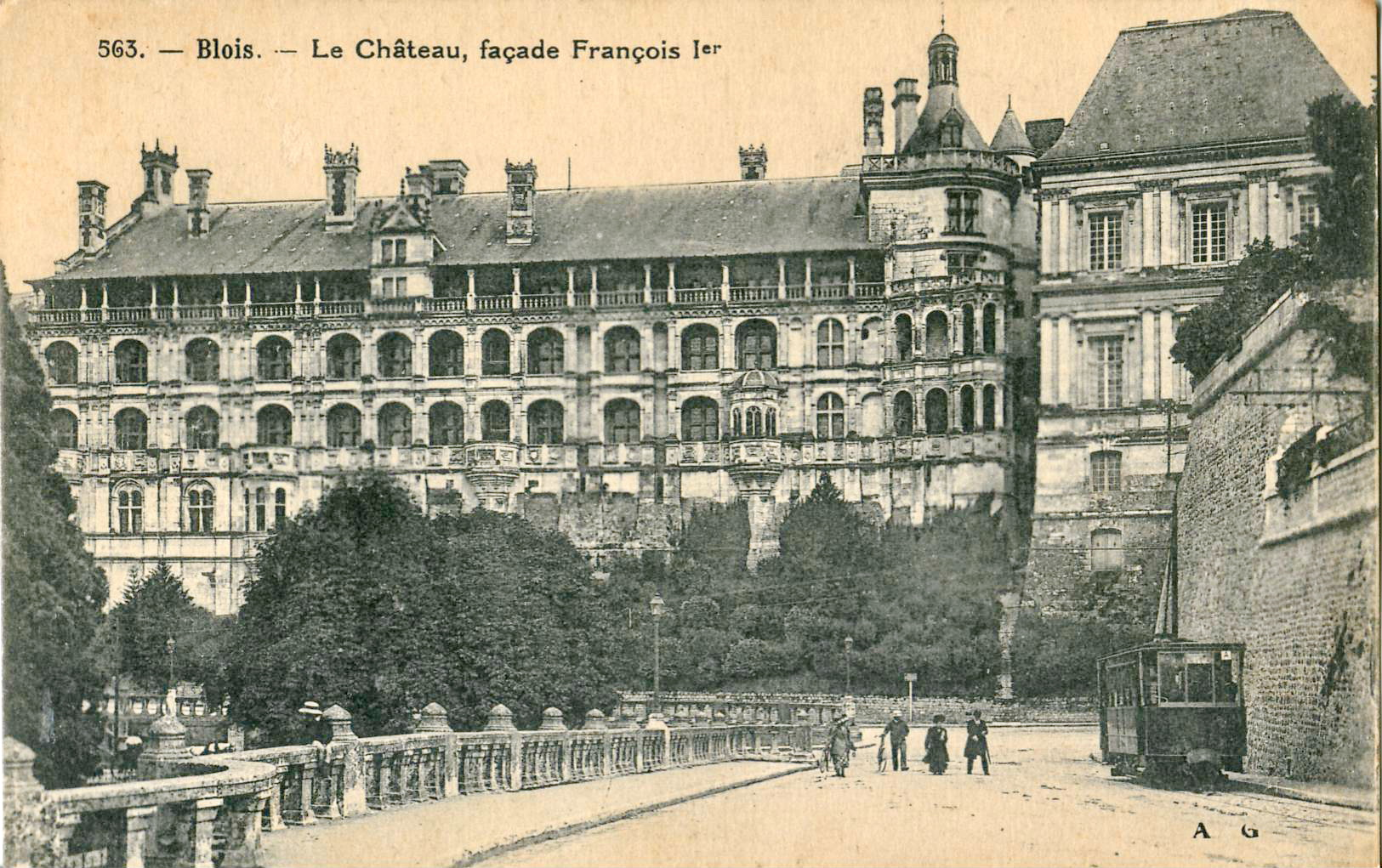 Carte postale ancienne éditée par AG, n°563 : BLOIS - Le Château, Façade François Ier